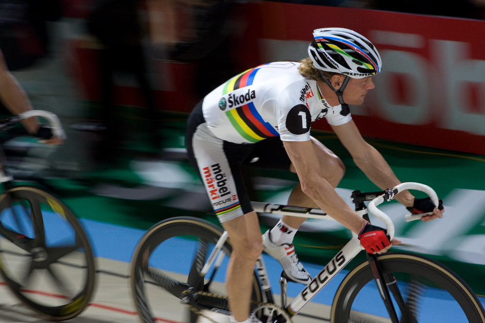 Bruno Risi, Sixdays Zürich 2007-2008